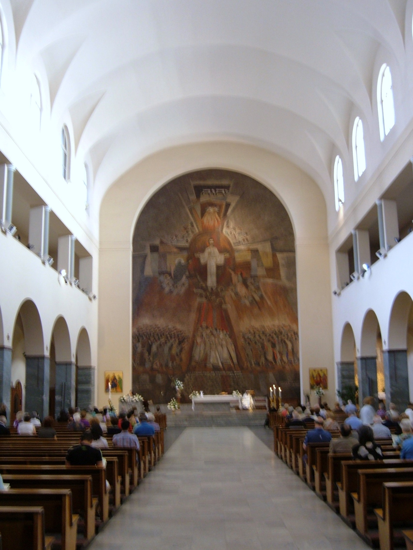 Chiesa di Santa Emerenziana, a Roma, nel quartiere Trieste.